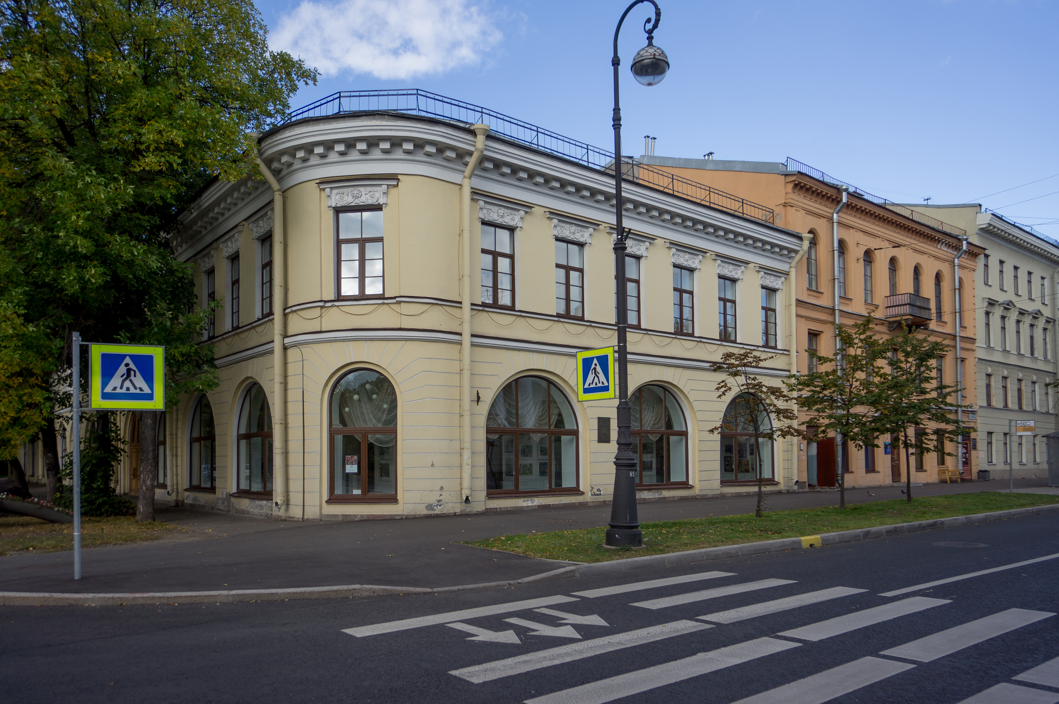 Жилой дом купца Касаткина: проспект Ленина, 57, улица Мартынова, 5-7, Кронштадт, Кронштадтский район, Санкт-Петербург